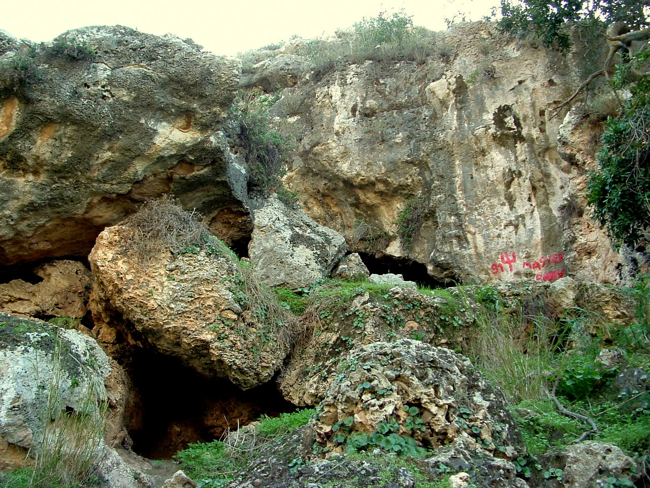 View from Sfunim Wadi - Mount Carmel Israel, Part of Carmel National Park מראות, נוף ומערות בנחל ספונים בהר הכרמל. הנחל הינו חלק מפארק הכרמל. הנחל שימש להתיישבות בתקופות הפרהיסטוריות. שרידים נמצאו בחפירות ארכאולוגיות בנחל ובמערות, כגון מערת ספונים